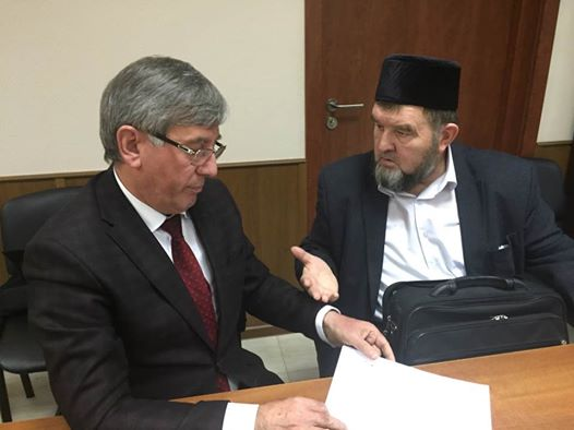 С шейхом Махмудом Велитовым в ожидании решения судьи, который удалился в совещательную комнату.